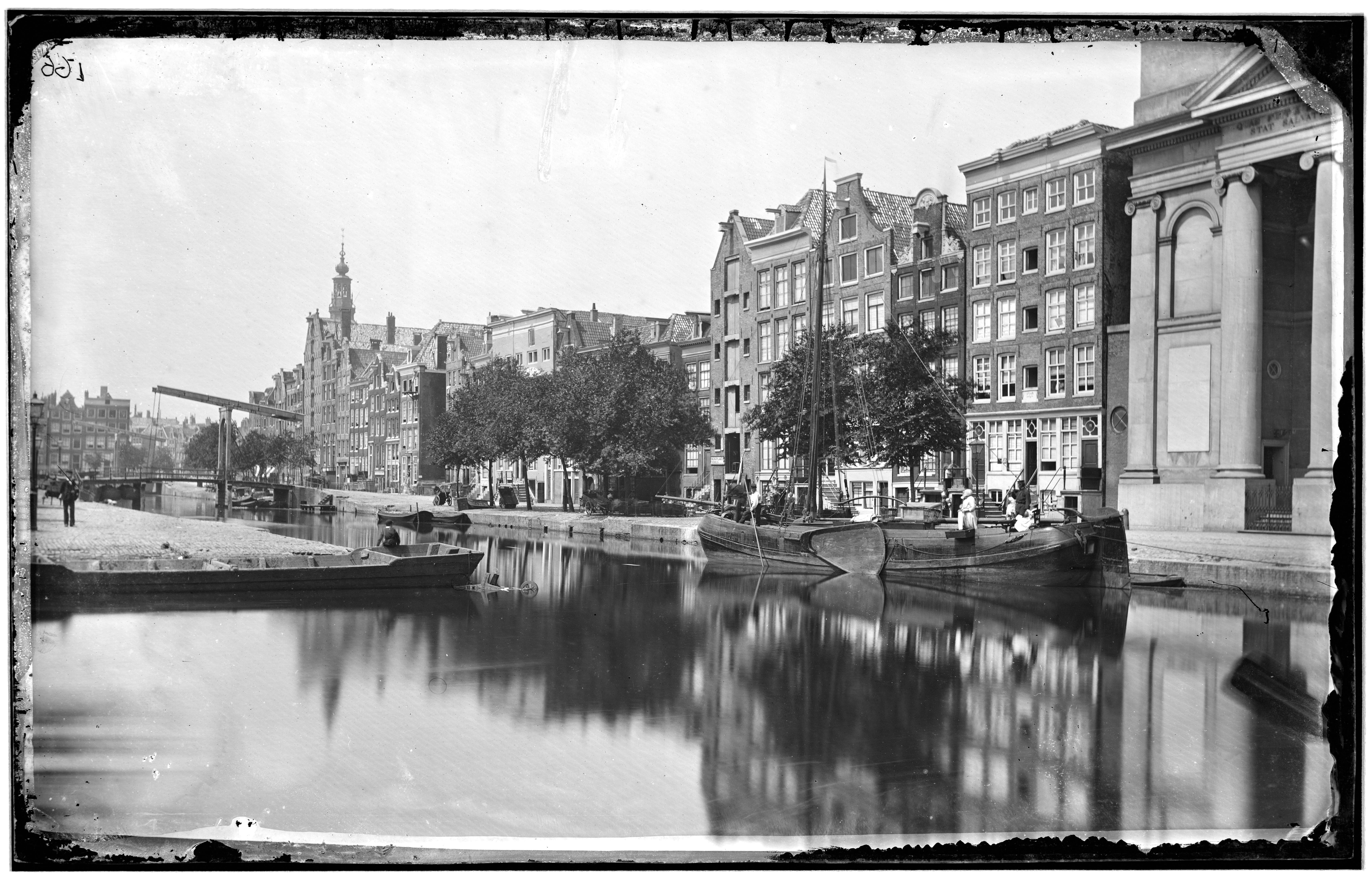 Beschrijving De Houtgracht gezien in westelijke richting naar de Zwanenburgwal, met uiterst rechts de rooms-katholieke Mozes en Aäronkerk op nummer 59 (ged.)Oorspronkelijke kabinetfoto uitgegeven door A. Jager.Documenttype fotoVervaardiger Jager, A.Gebroeders Douwes (uitgever)Collectie Collectie Kunsthandel Gebr. Douwes: glasnegatievenDatering 1867 t/m 1882Geografische naam HoutgrachtWaterloopleinGebouw Mozes en AäronkerkInventarissen B00000031256 Generated with Dememorixer